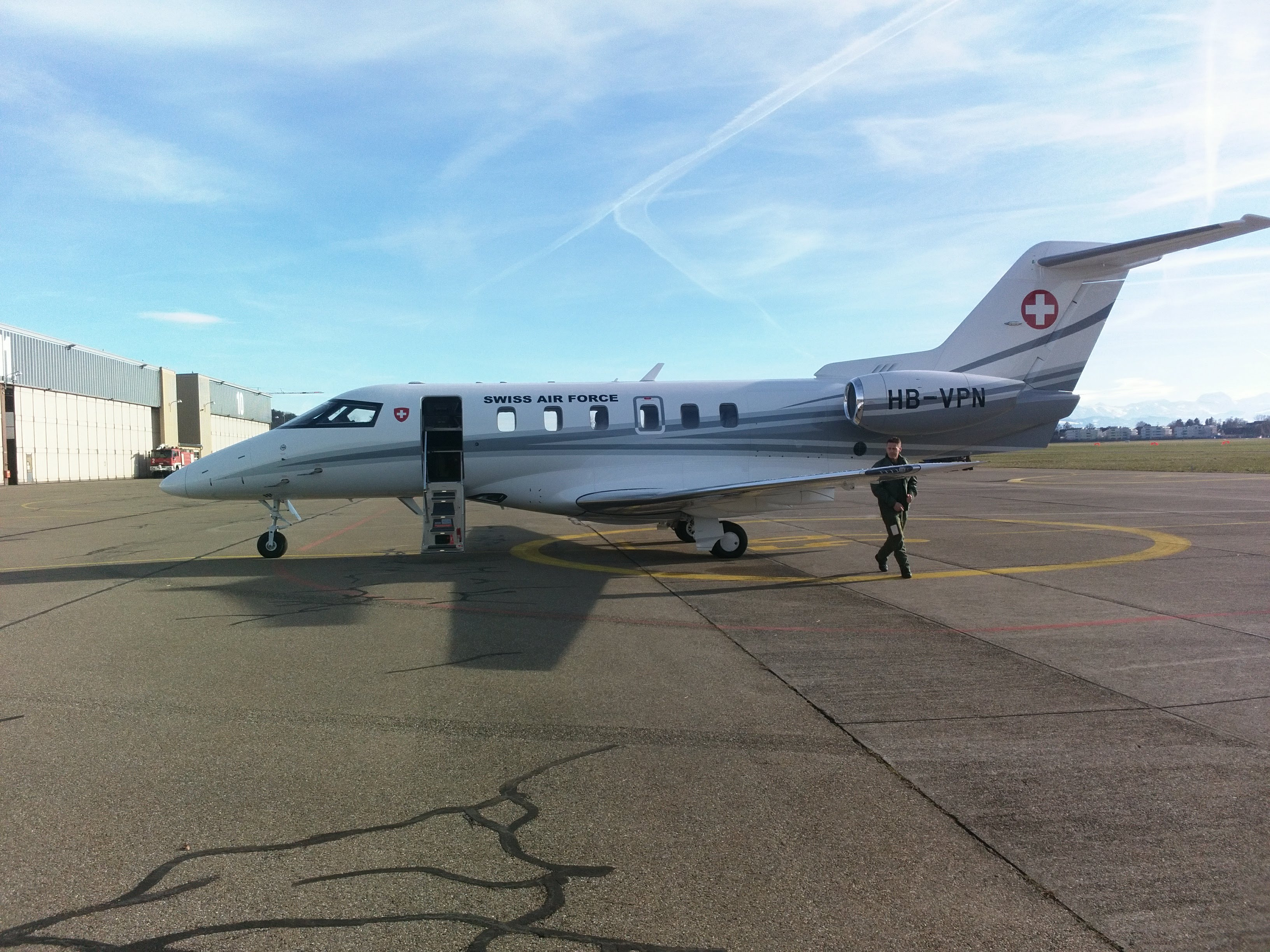 Swiss Air Force PC-24 T-786 with deliveryreg HB-VPN